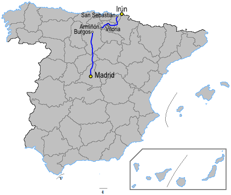 Mapa de la autovía A1